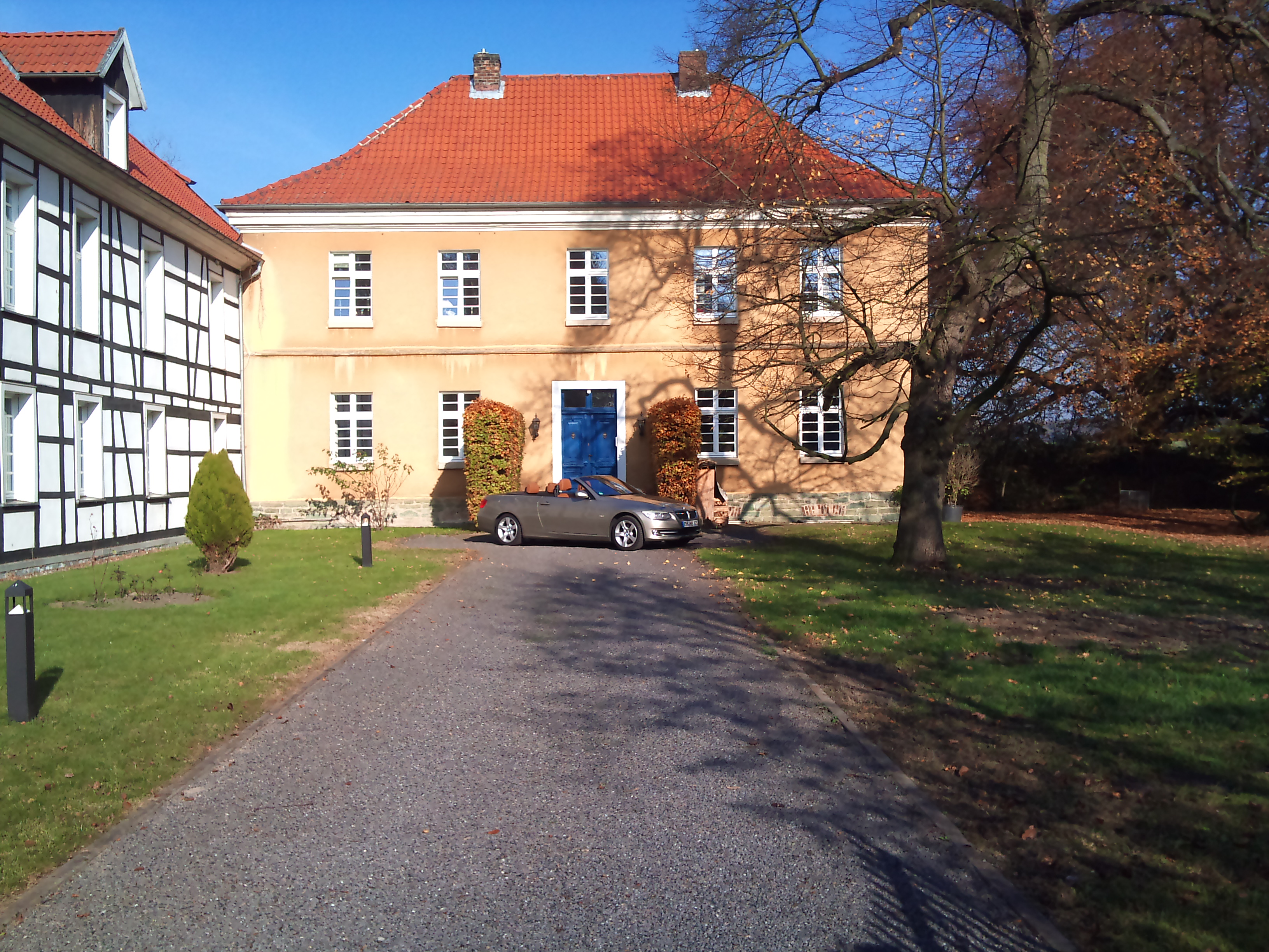 Frontalansicht des Hauses Hilbeck in Werl-Hilbeck im Herbst